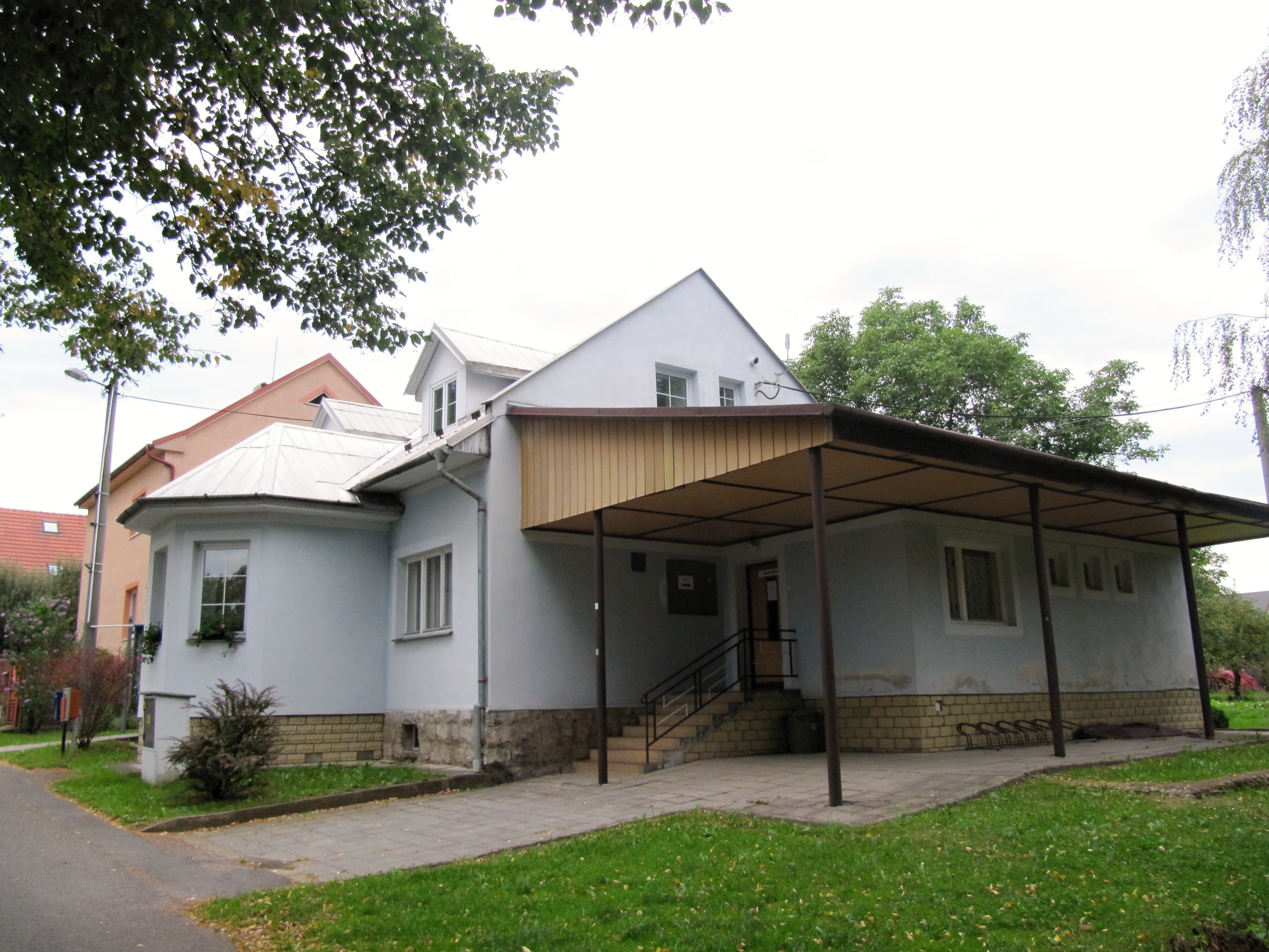 Kateřinice (NJ)